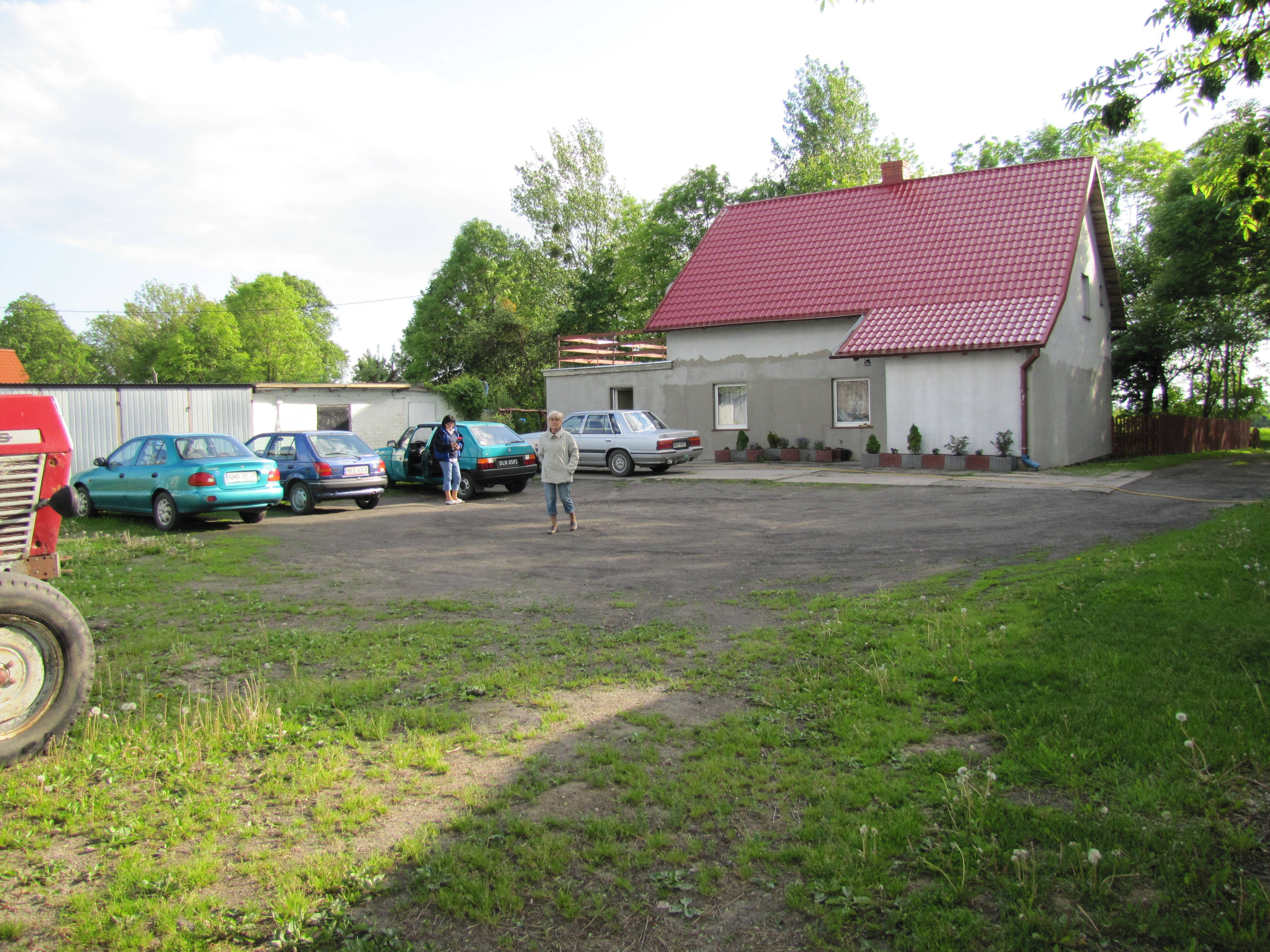 Obejście gospodarskie.